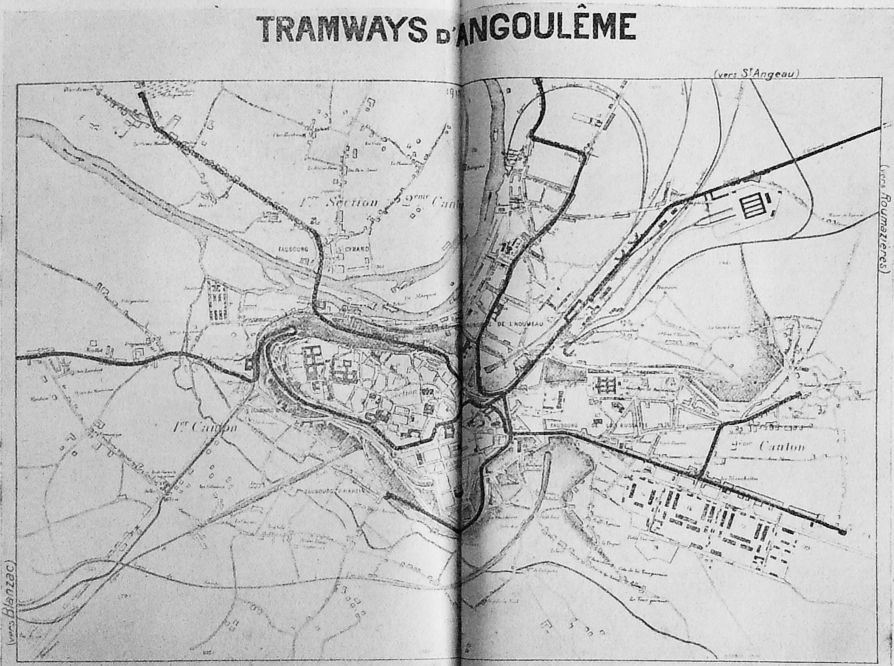 Plan du réseau de tramway d'Angoulême